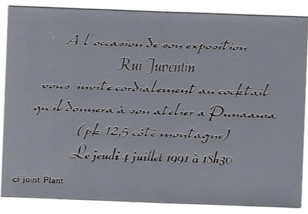 Invitation Punaauia 1991